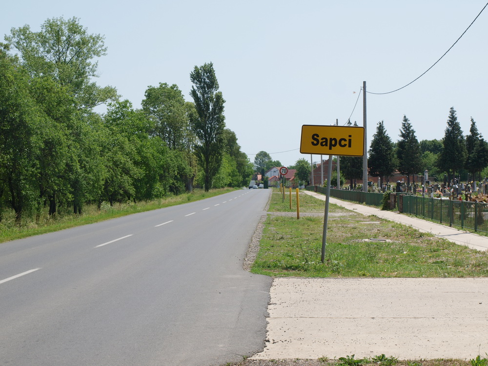 Ulaz u selo Sapci, Brodsko-posavska županija.